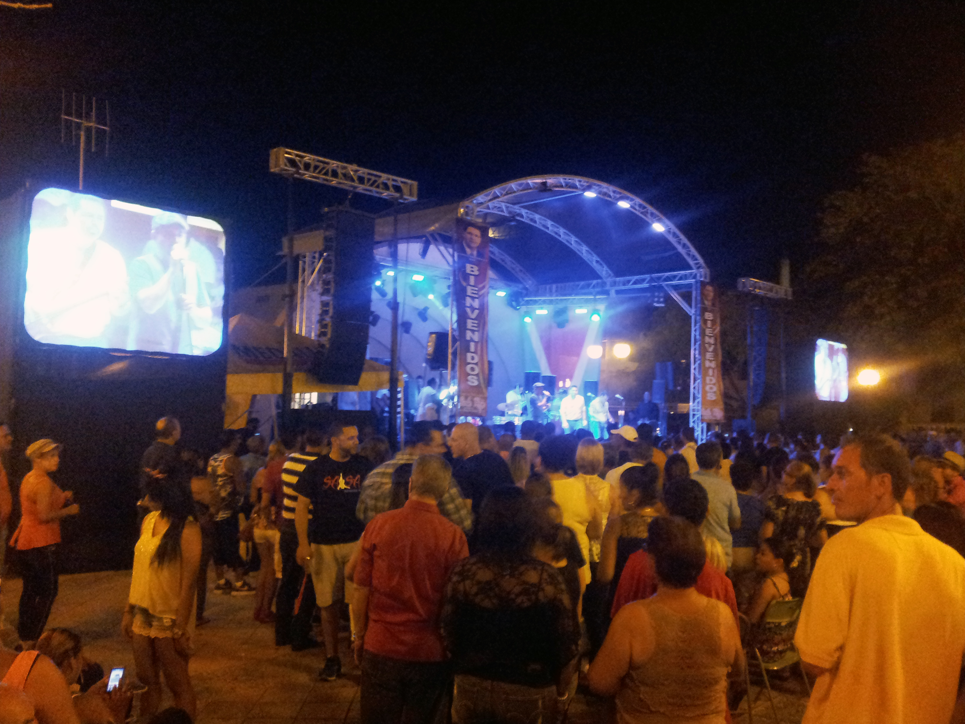 Fiestas Patronales San Miguel Arcángel.